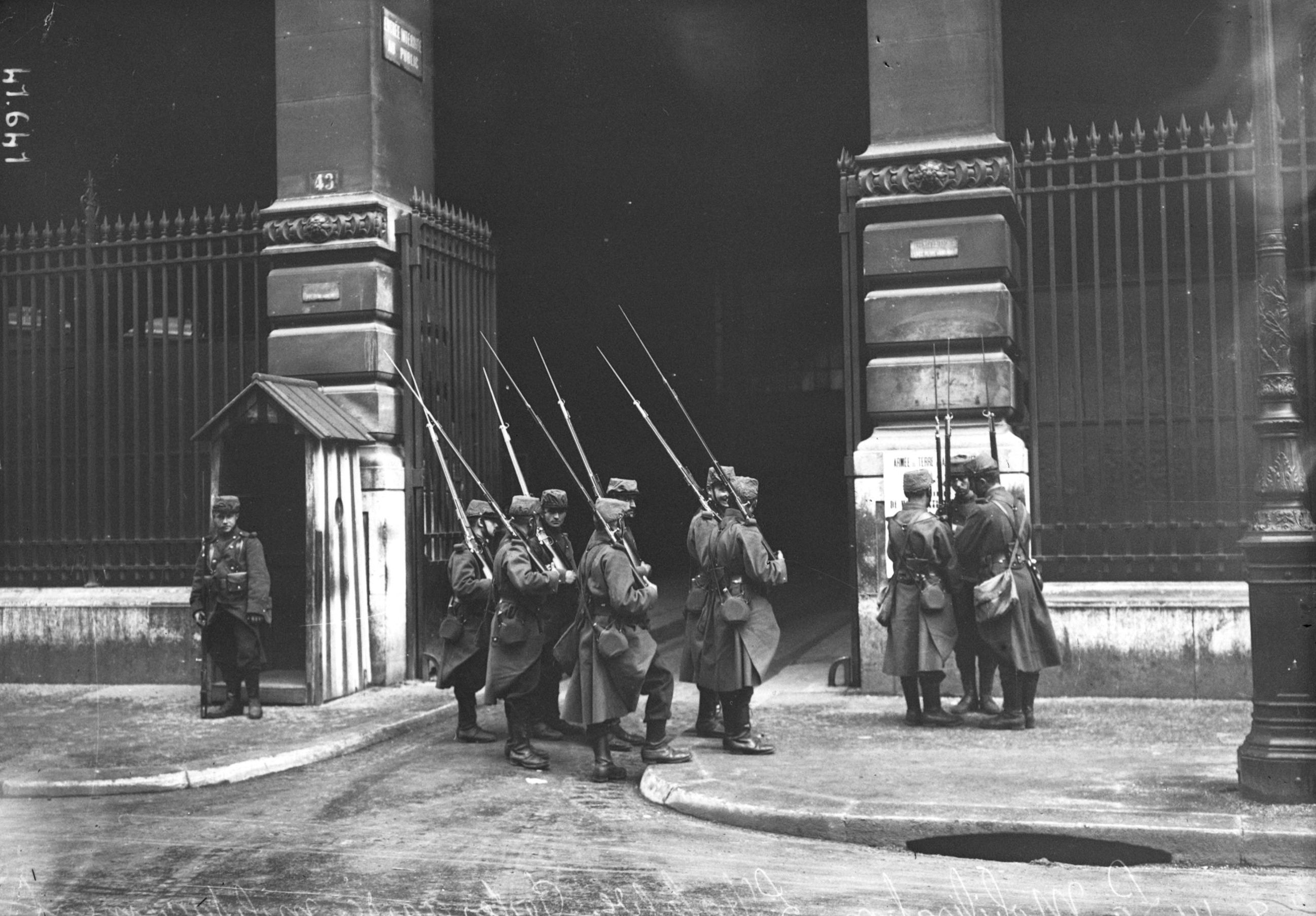 L'Hôtel des Postes de Paris, gardé militairement, le 2 août 1914.Information complémentaire: aujourd'hui Poste Centrale du Louvre, n° 52 rue du Louvre (n° 43 selon l'ancienne numérotation). [1]